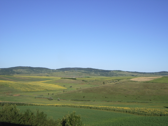 paysage 3